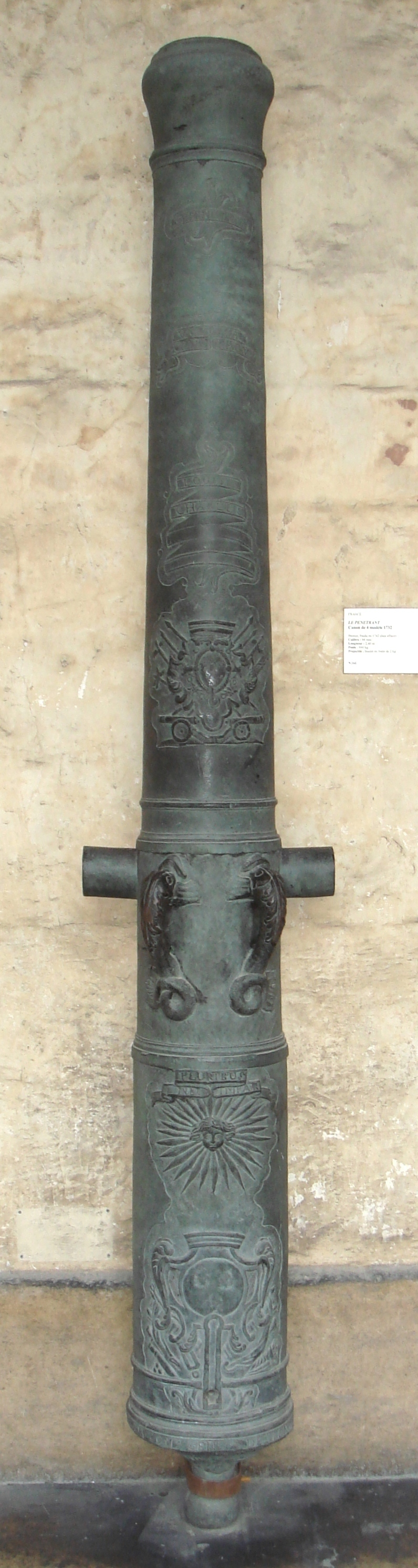 Canon_de_4_1732_Le_Penetrant.